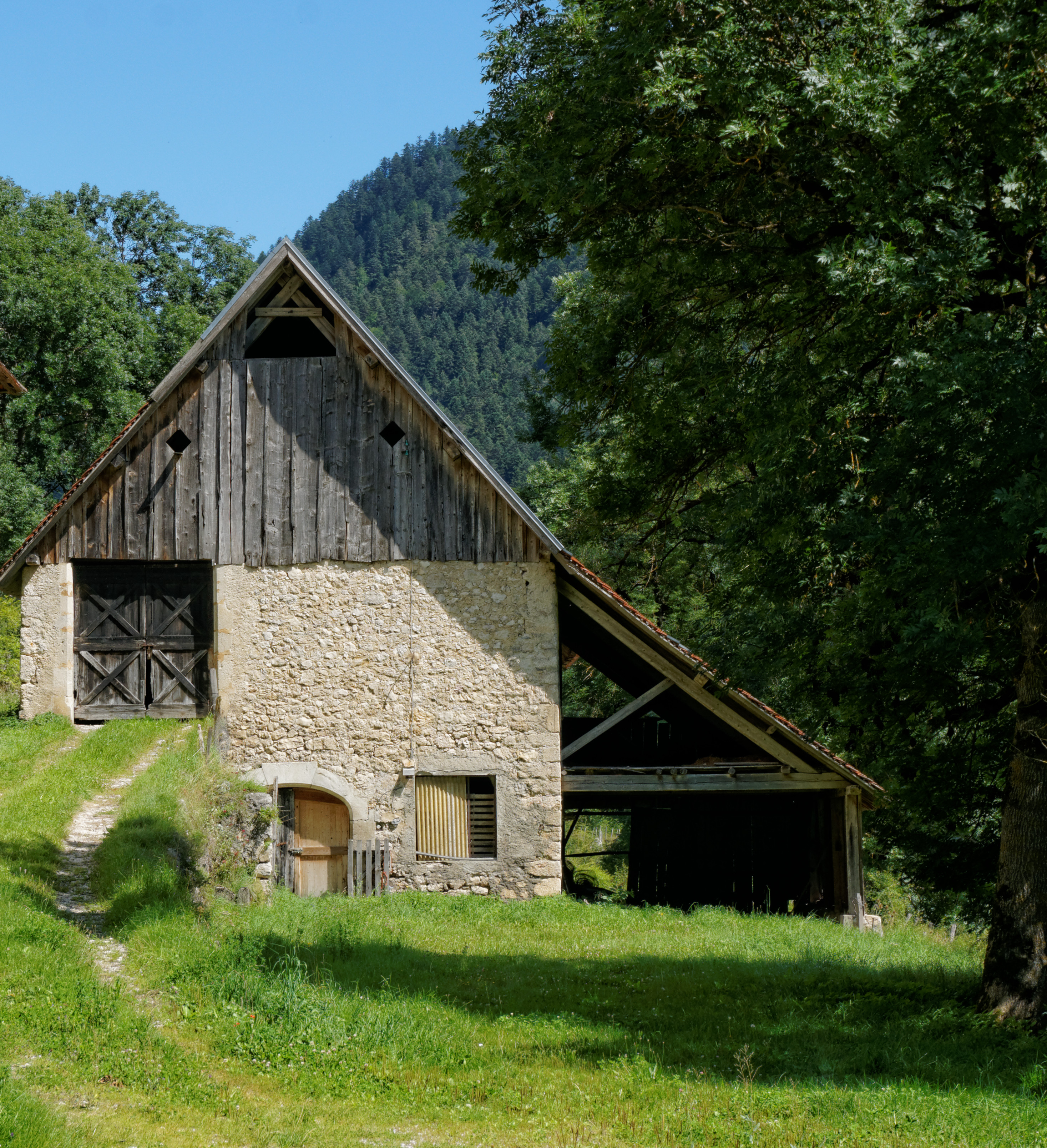 Une grange dans le hameau de Ruthière